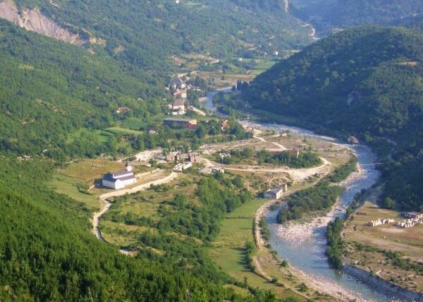 Qëndra Breg-Lumi, Shalë